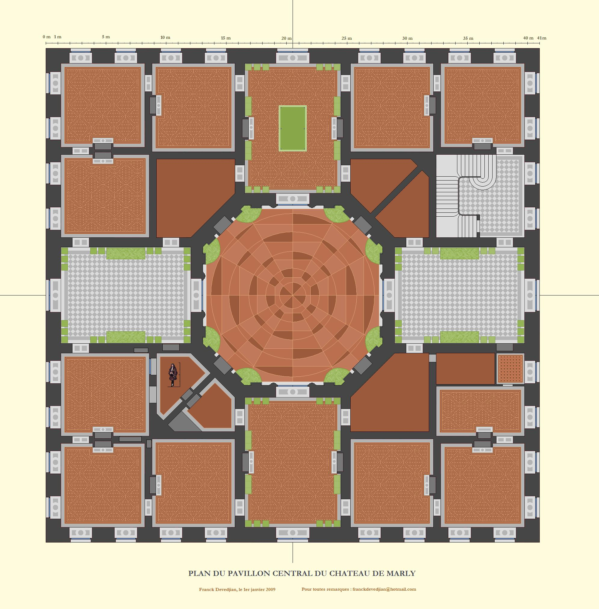 Plan du rez de chaussée du pavillon central du Château de Marly